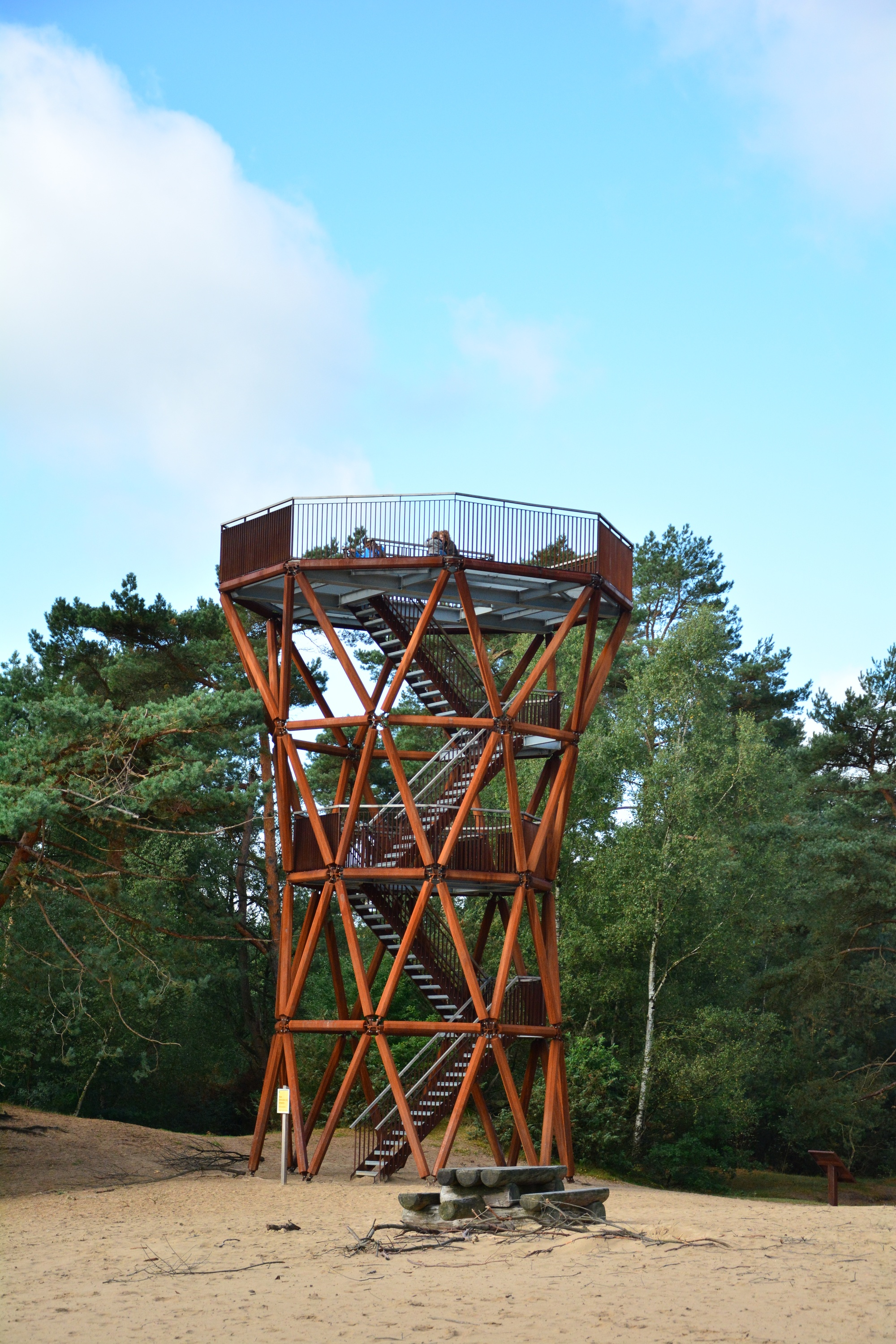 Uitkijktoren in het stuifzand gebied Kootwijkerzand